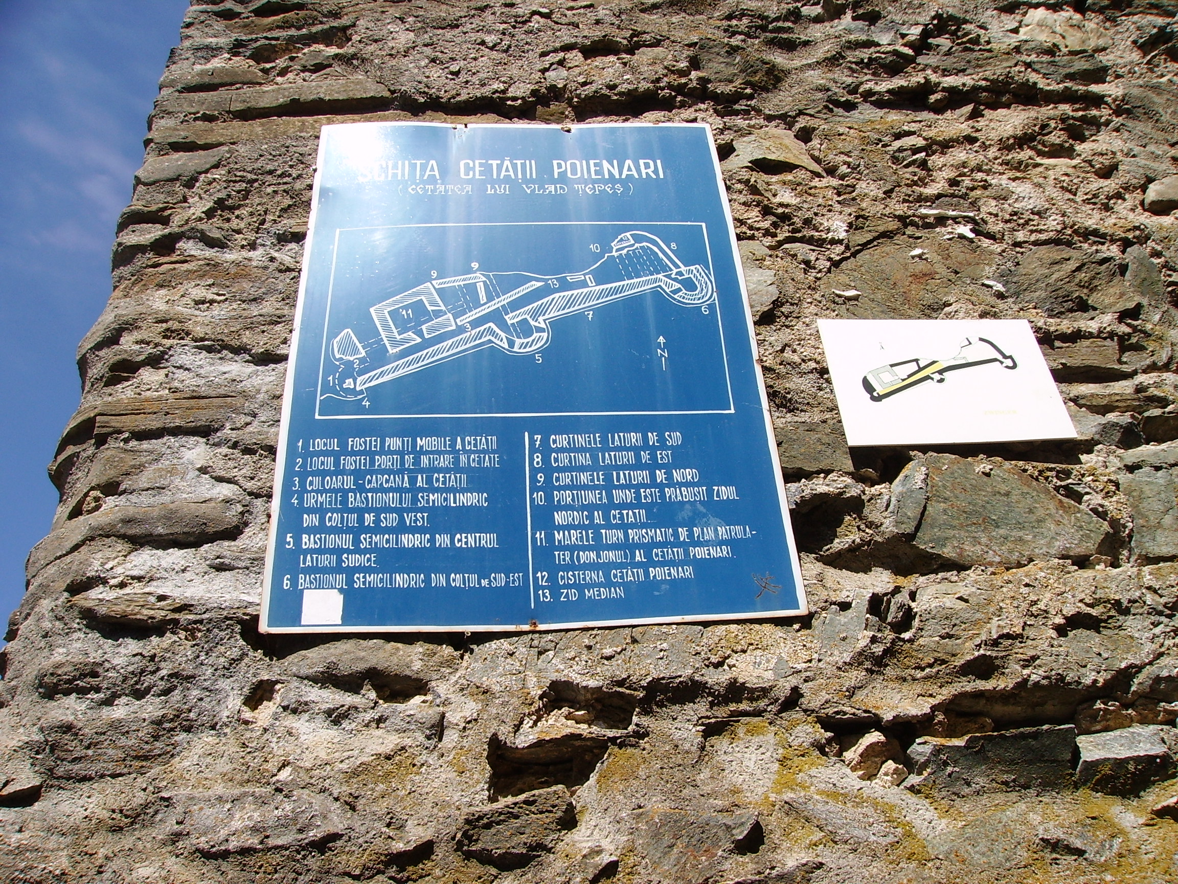 Schita Cetatii Poenari scoate in evidenta rolul pentru care aceasta a fost construita si anume rolul de fortareata